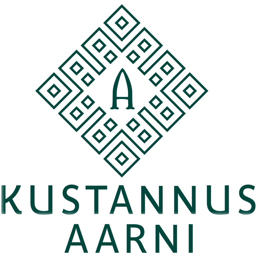 Kustannus Aarnin logo